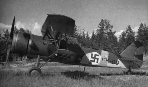 Fokker C.X from Finland